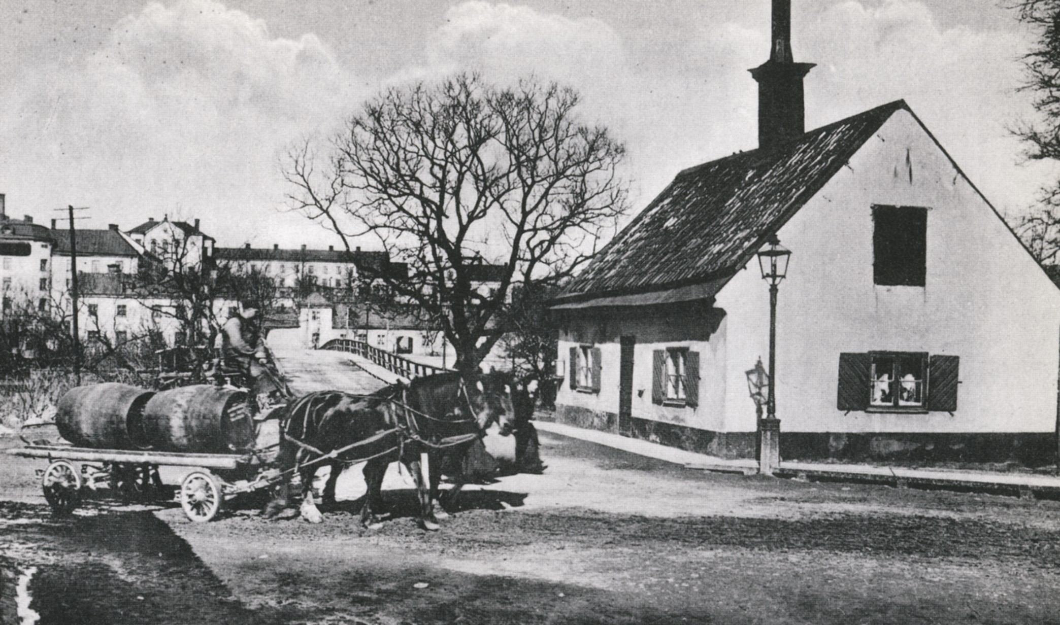 Långholmens vintertull-stuga i Stockholm